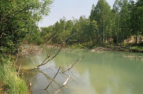 Kanał Szczakowski, Kanał Główny.